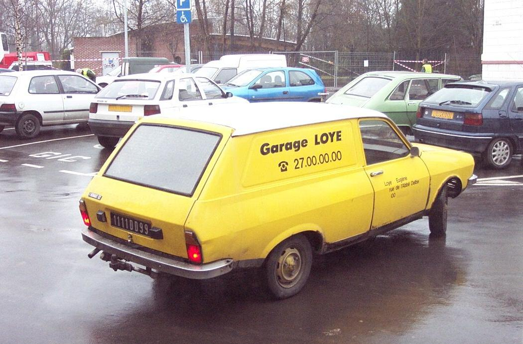 Rare carrosserie break-service.